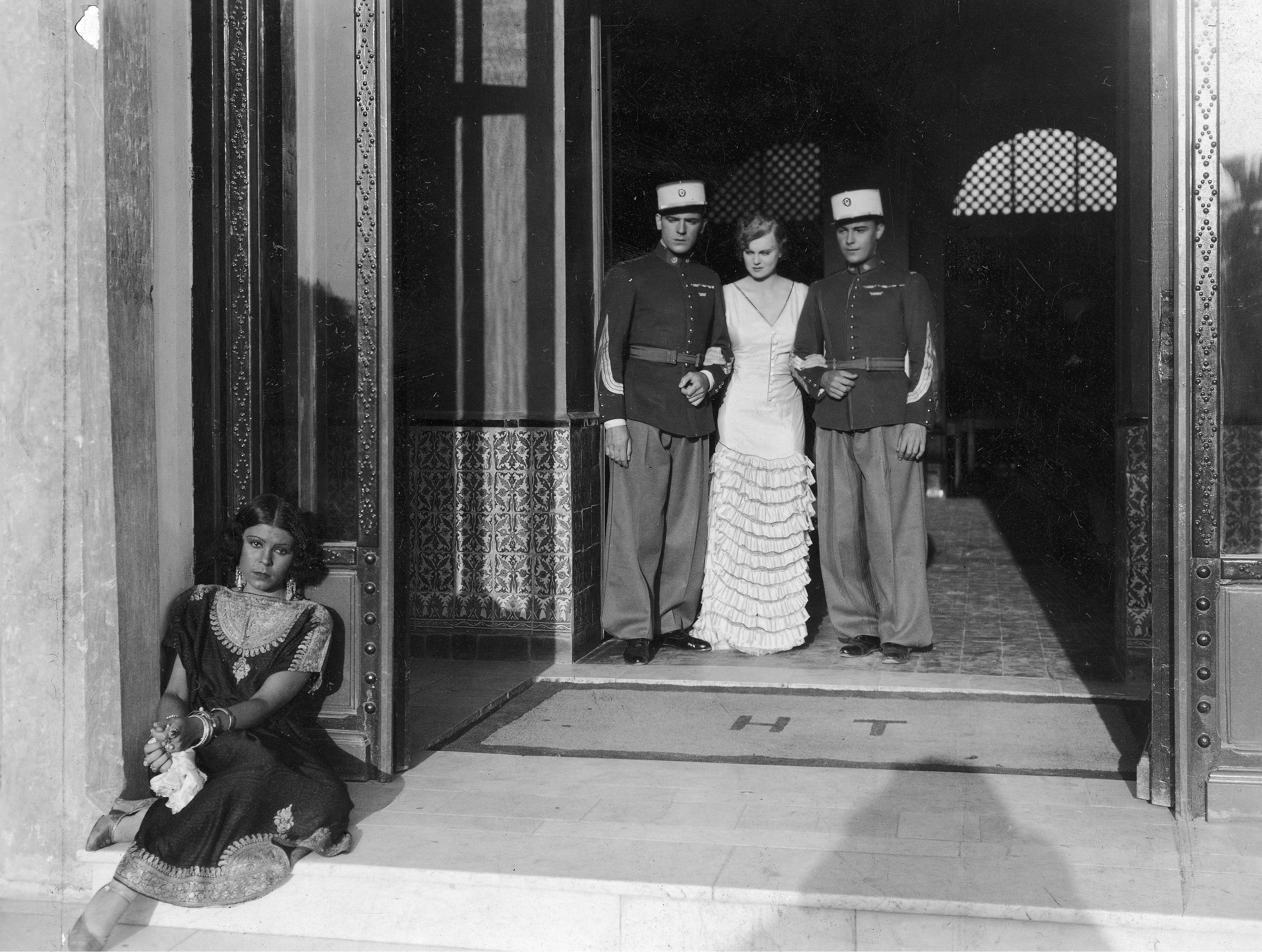 Nora Ney (siedzi przed wejściem), Adam Brodzisz (stoi z lewej), Maria Bogda (stoi w środku) i Witold Conti w jednej ze scen filmu Głos pustyni (1932 r.)